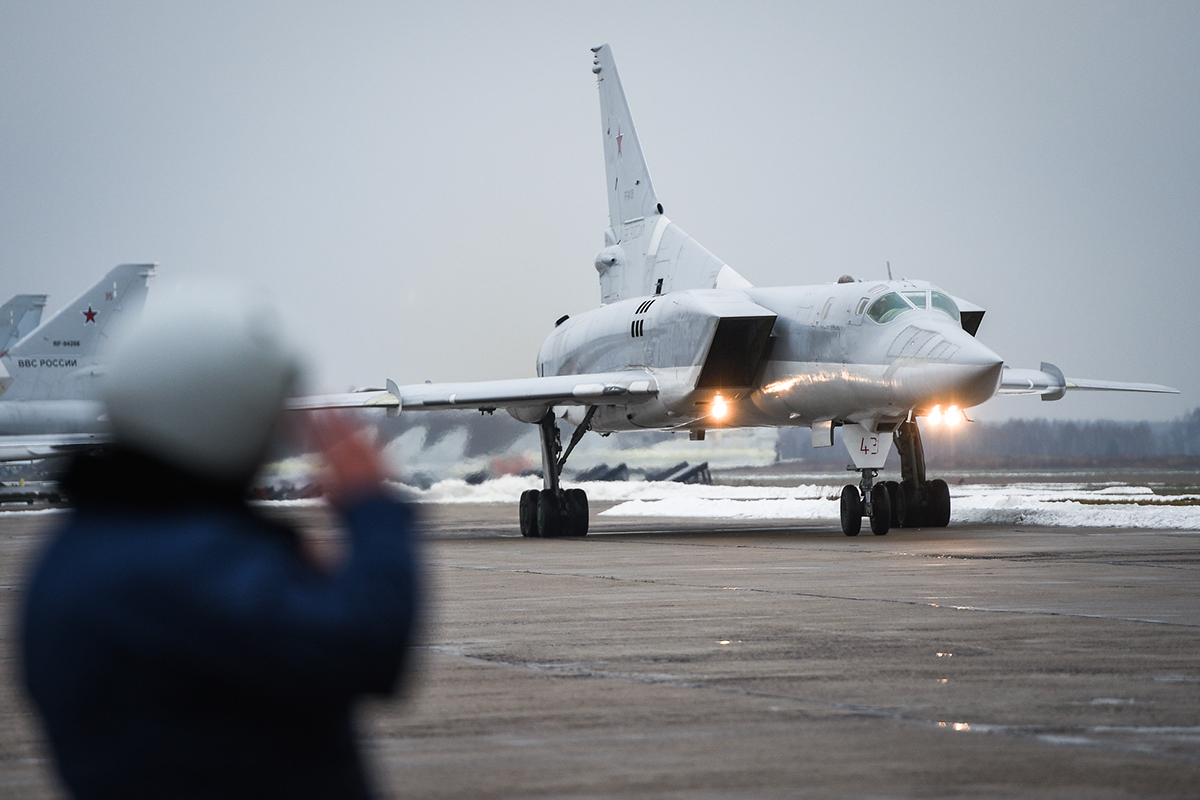 Возвращение самолётов дальней авиации ВКС России на аэродромы базирования (Калужская область, аэродром Шайковка).